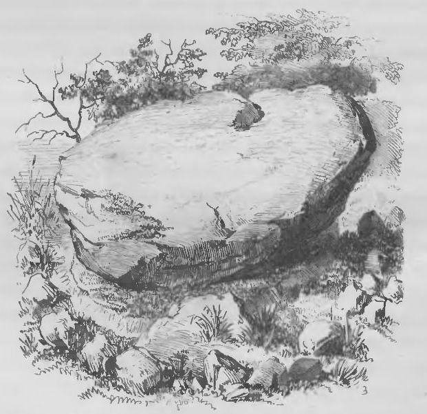 Беларуская (тарашкевіца): Тупальшчынскі вялікі камень на малюнках К.Тышкевіча з кнігі «Wilja i jej brzegi» 1871 г.